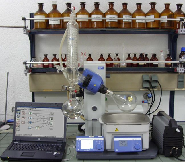 PC-Steuerung eines Rotationsverdampfers